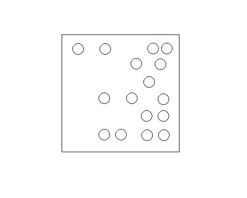 Random supersämplimine